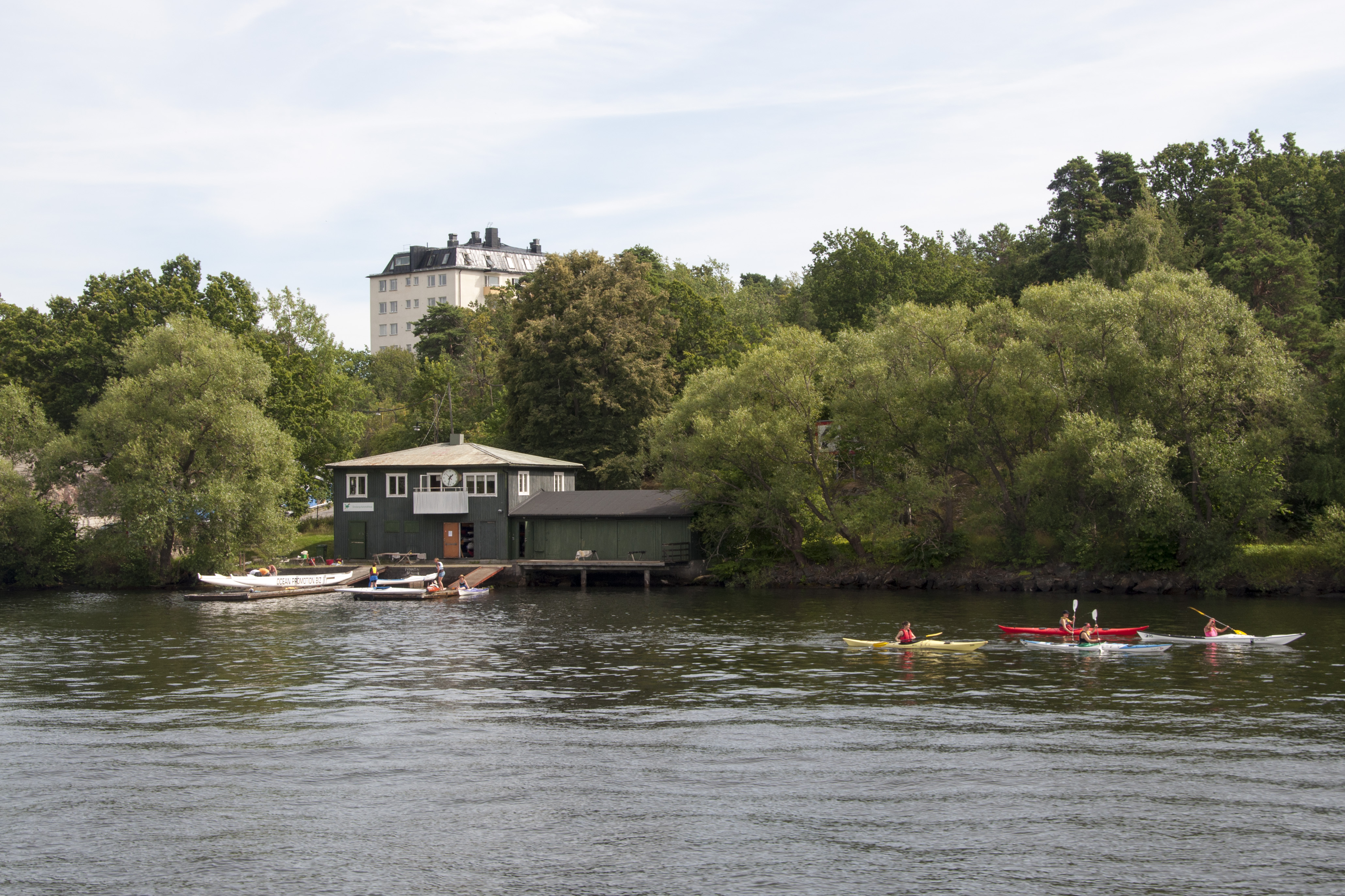 Örnsbergs kanotsällskap, Gröndal Gustaf Edström (Arkitekt) Rolf Ekevik (Byggmästare) Stockholms stads idrotts- och friluftsstyrelse (Arkitektkontor) Örnsbergs Kanotsällskap (Byggherre)